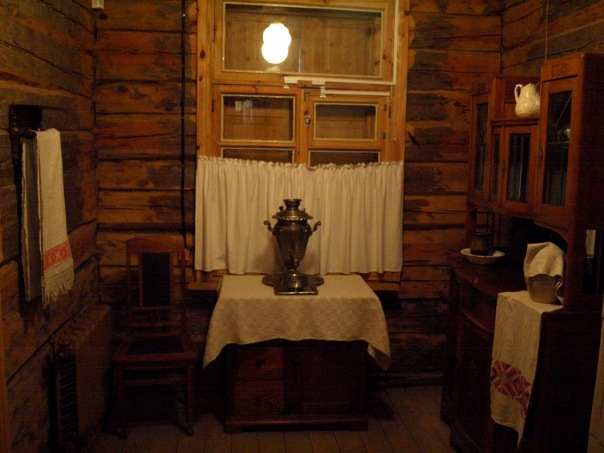 Беларуская (тарашкевіца): Мясьціны жыцьця і творчасьці Я. Купалы: дом Я. Купалы, дом шафёра, лазьня, гаспадарчыя пабудовы, помнік Я. Купалу. в. Ляўкі This is a photo of Belarusian heritage monument. Reference number: 213Б000134 ( WLM)